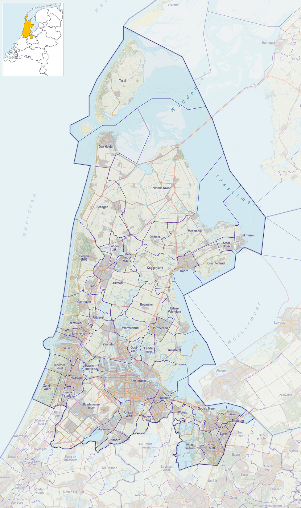 Positiekaartje van de provincie, variant "gemeentelabels"